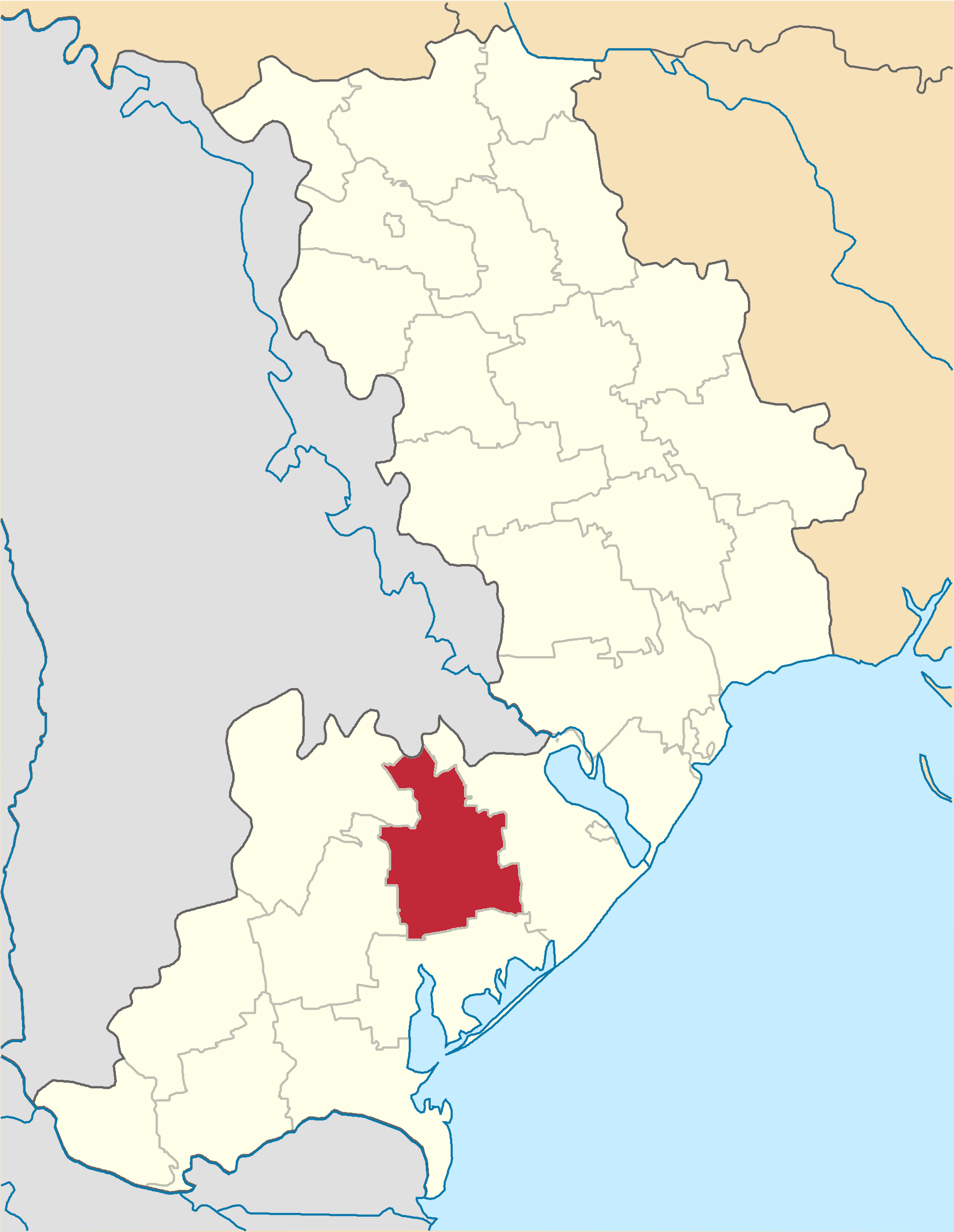 Saratskyi-Raion map